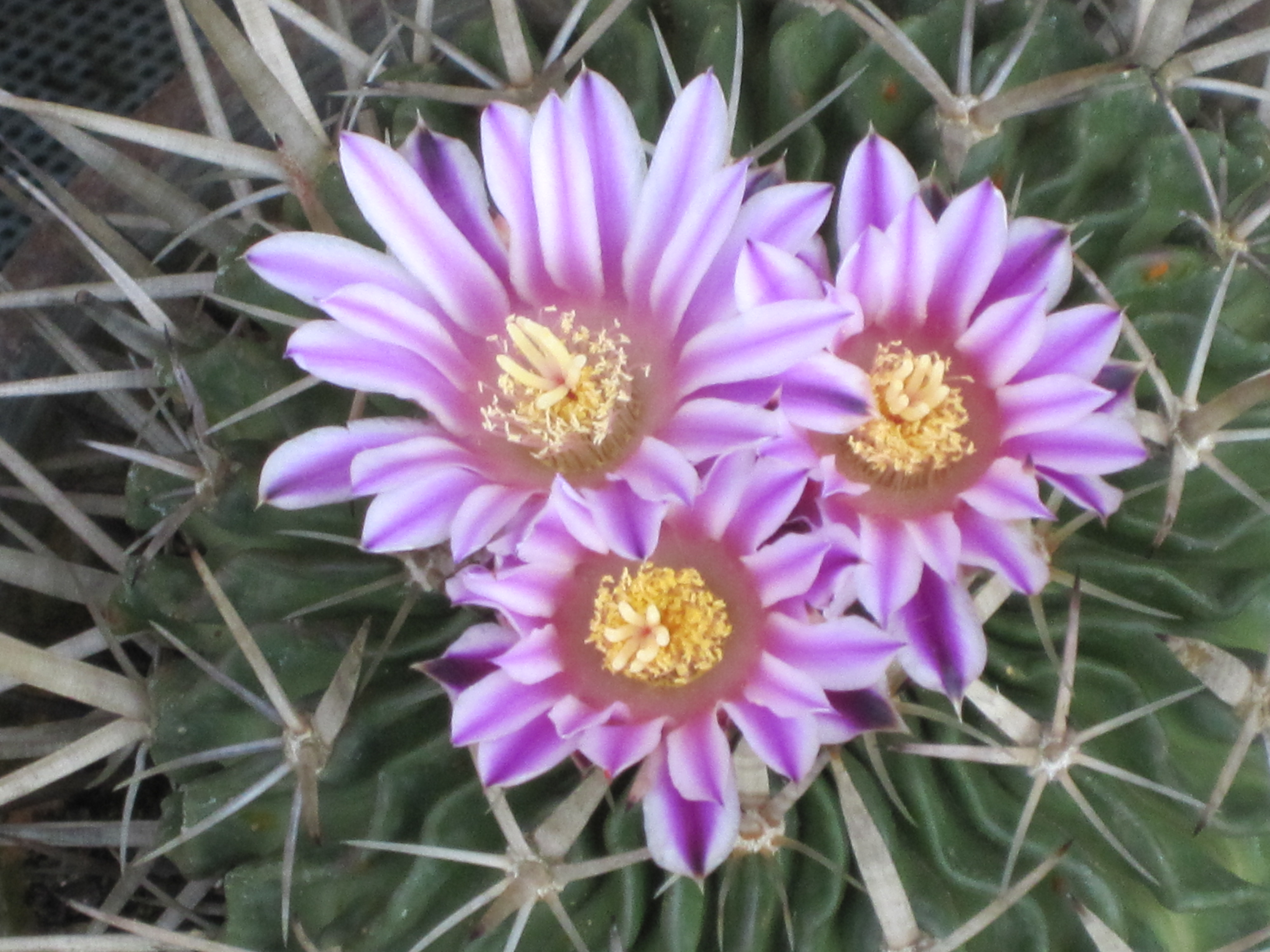 I fiori dello stenocactus crispatus